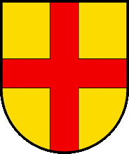 Wappen der früheren Ortsgemeinde Tägerschen